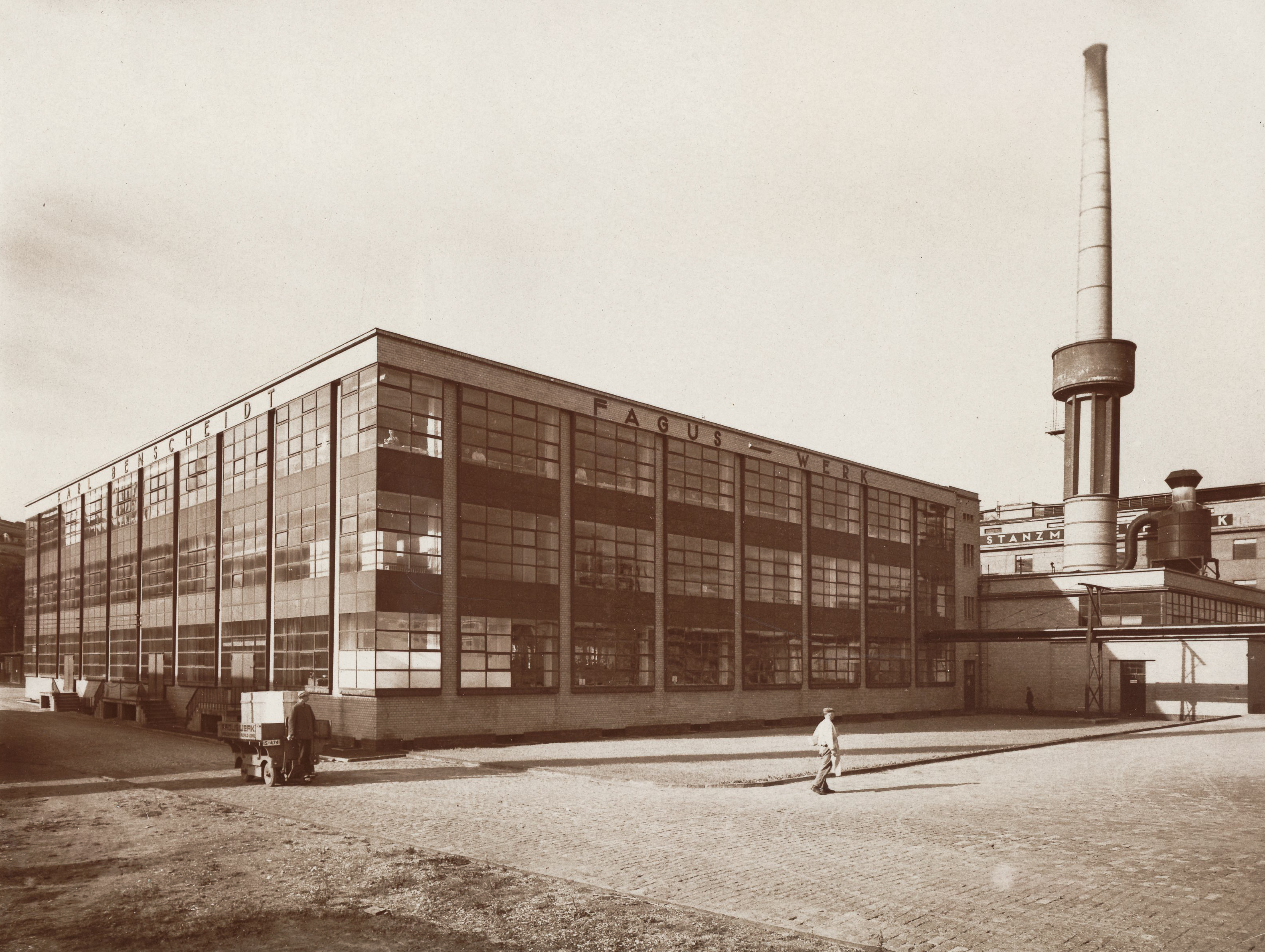 Das 1911-1914 durch die Architekten Walter Gropius und Adolf Meyer erbaute Fagus-Werk in Alfeld an der Leine, hier in einer Aufnahme des Fotografen Edmund Lill. Deutlich zu erkennen ist in der Vergrößerung auch der Name Karl Benscheidt sowie einige Arbeiter hinter den Fenstern bei ihrer Beschäftigung. Besitz (Provenienz): Landesmuseum für Kunst und Kulturgeschichte Oldenburg aus dem Nachlass seines ehemaligen Direktors Walter Müller-Wulckow ...